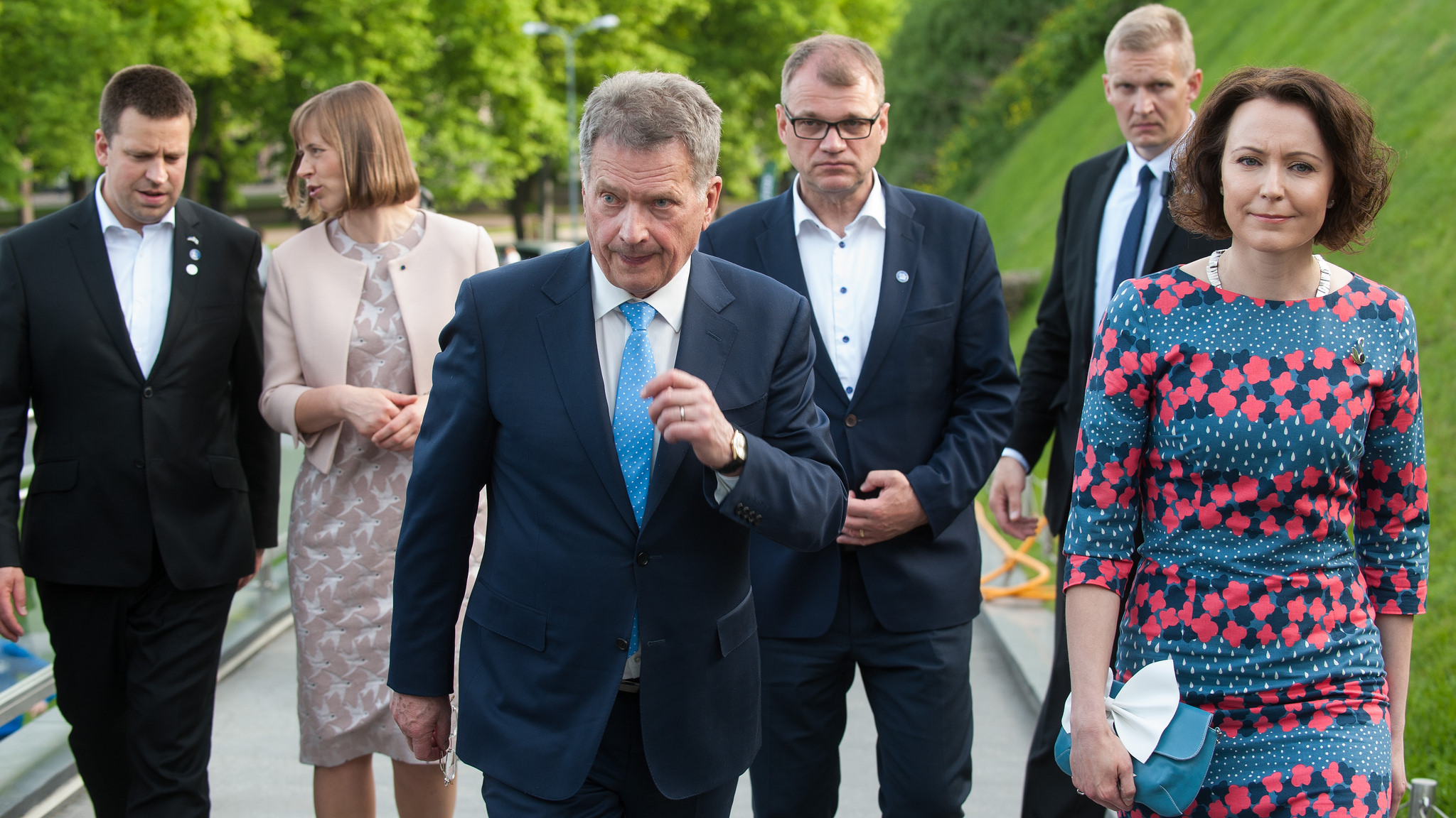 10. juunil 2017 toimus Tallinnas suur Soome päev, mis oli pühendatud Soome 100. juubelile. Toimus ka ainulaadne kohtumine, mil Tallinnas olid koos mõlema maa presidendid ja peaministrid. Vasakult: Eesti Vabariigi peaminister Jüri Ratas, Eesti Vabariigi president Kersti Kaljulaid, Soome Vabariigi president Sauli Niinistö, Soome Vabariigi peaminister Juha Sipilä, Soome Vabariigi presidendi abikaasa Jenni Haukio. Foto tegi Sven Tupits Soome Suursaatkonna ja Soome Instituudi tellimusel.